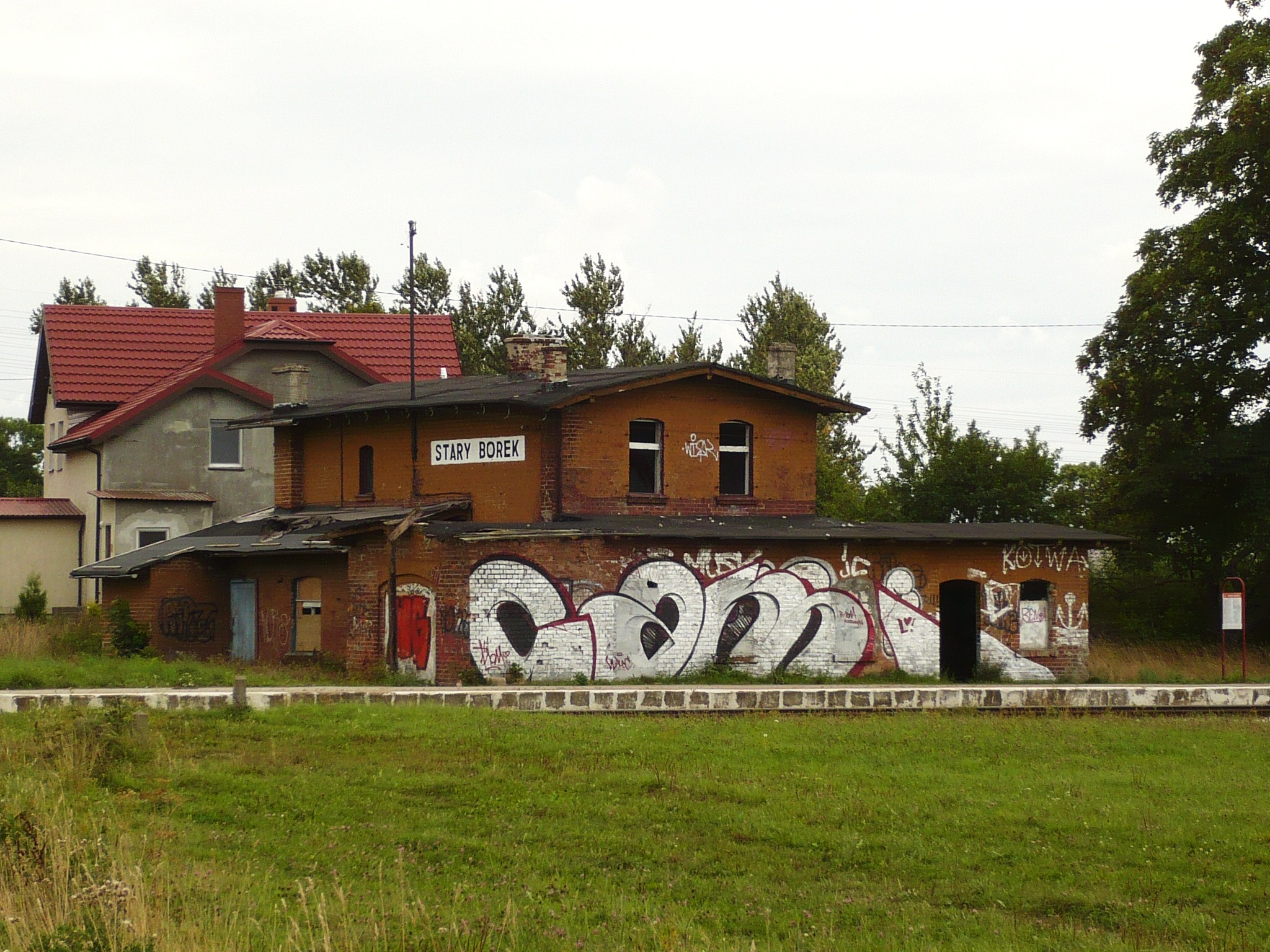 Stary Borek, stacja kolejowa